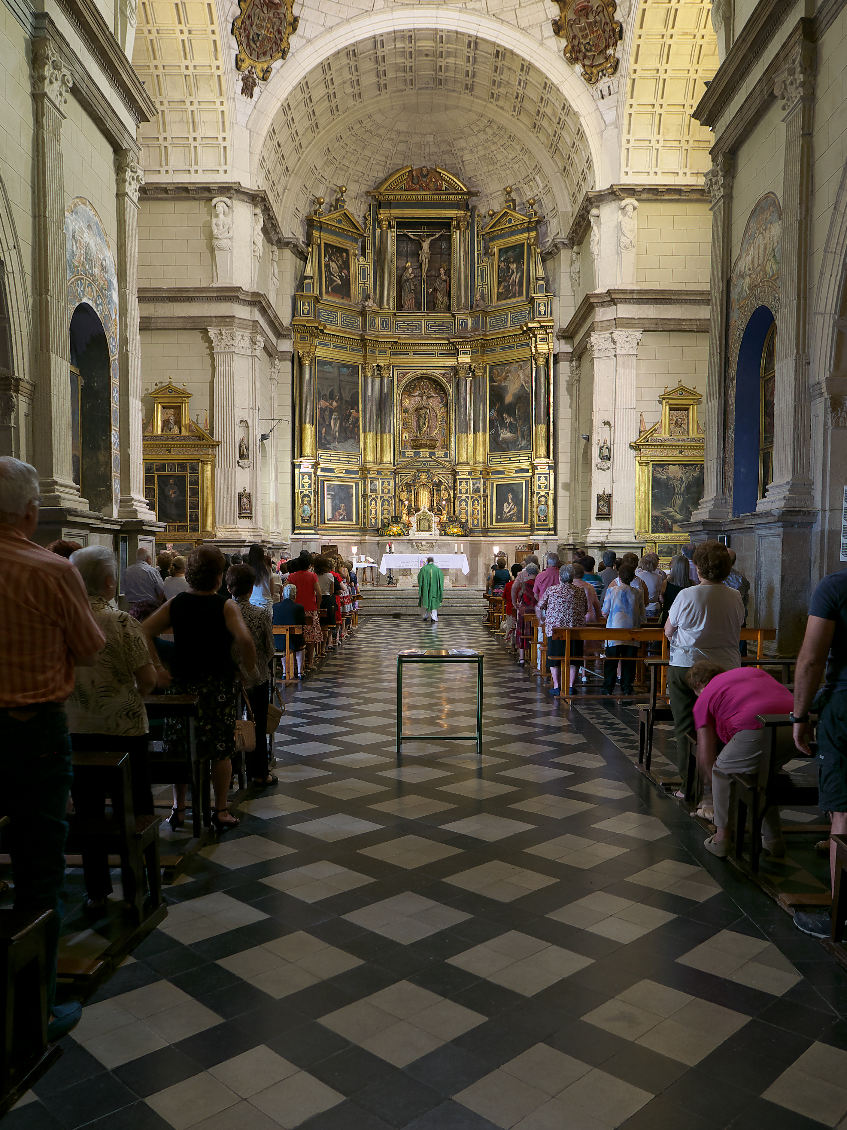 Iglesia conventual trazada por Alonso de Covarrubias, mediados del XVI.